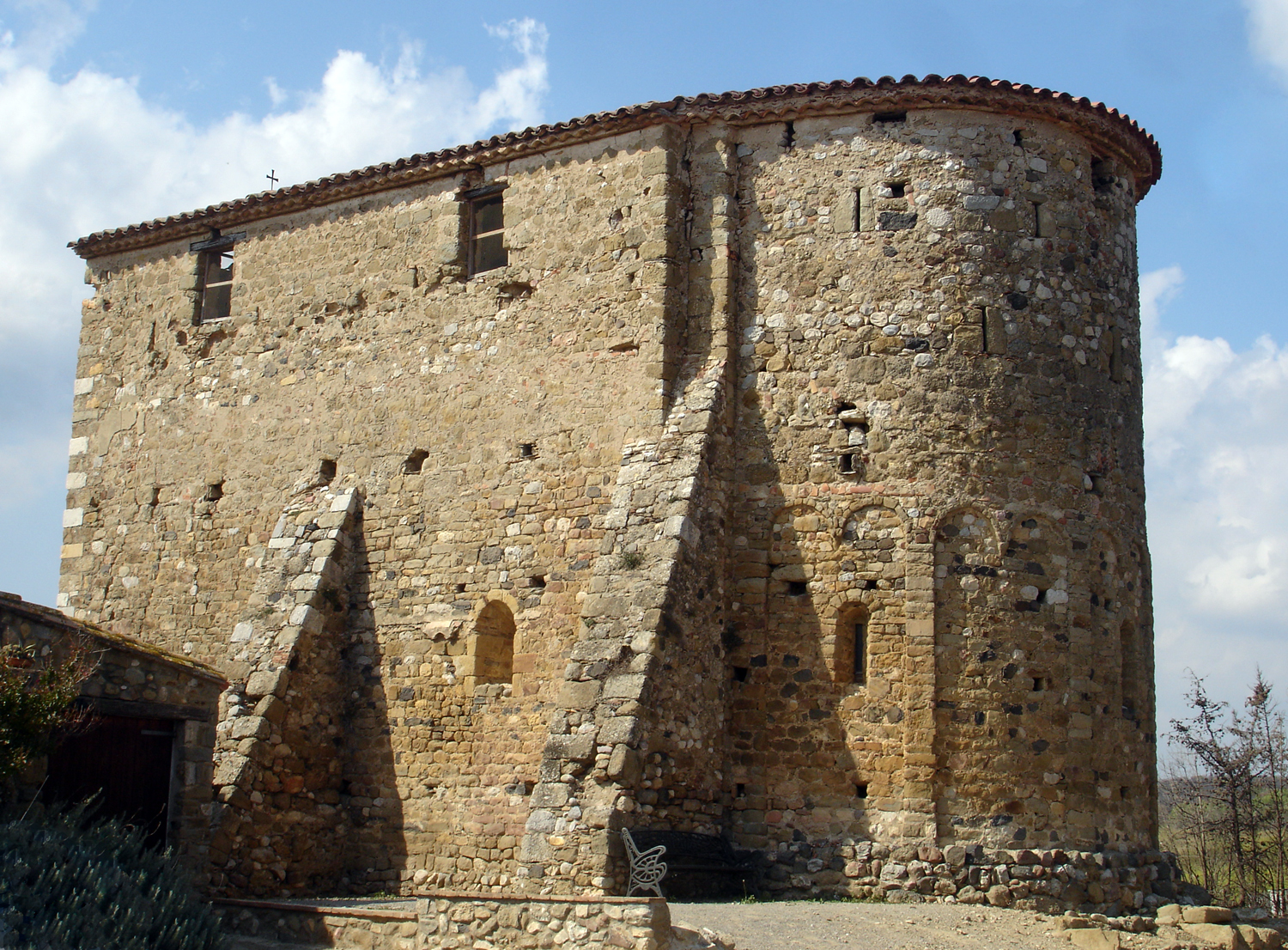 Esglèsia de Sant Esteve de Maranyà (Girona, Catalunya, Espanya)